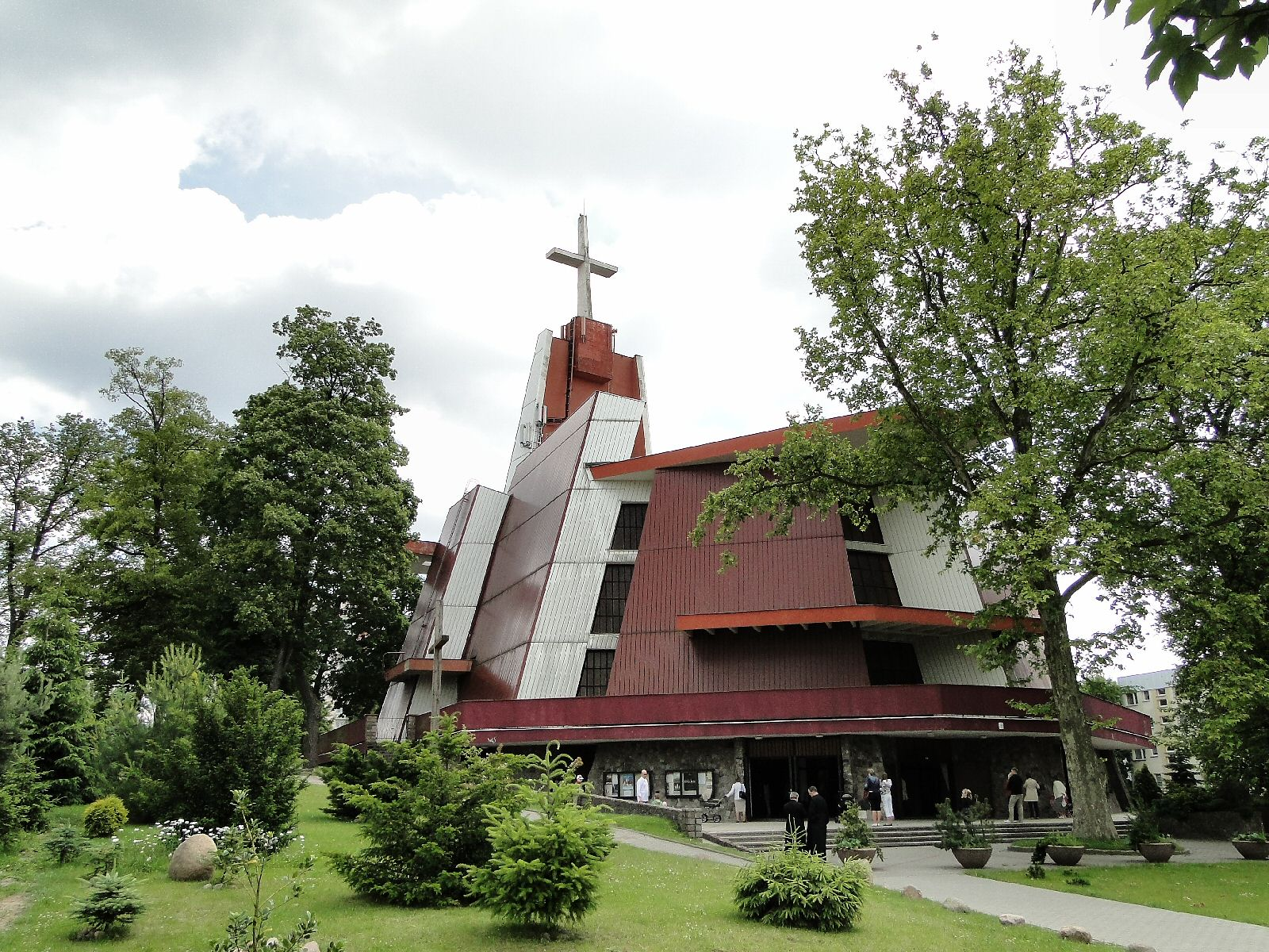 Kościół Miłosierdzia Bożego w Szczecinie - elewacja zachodnia